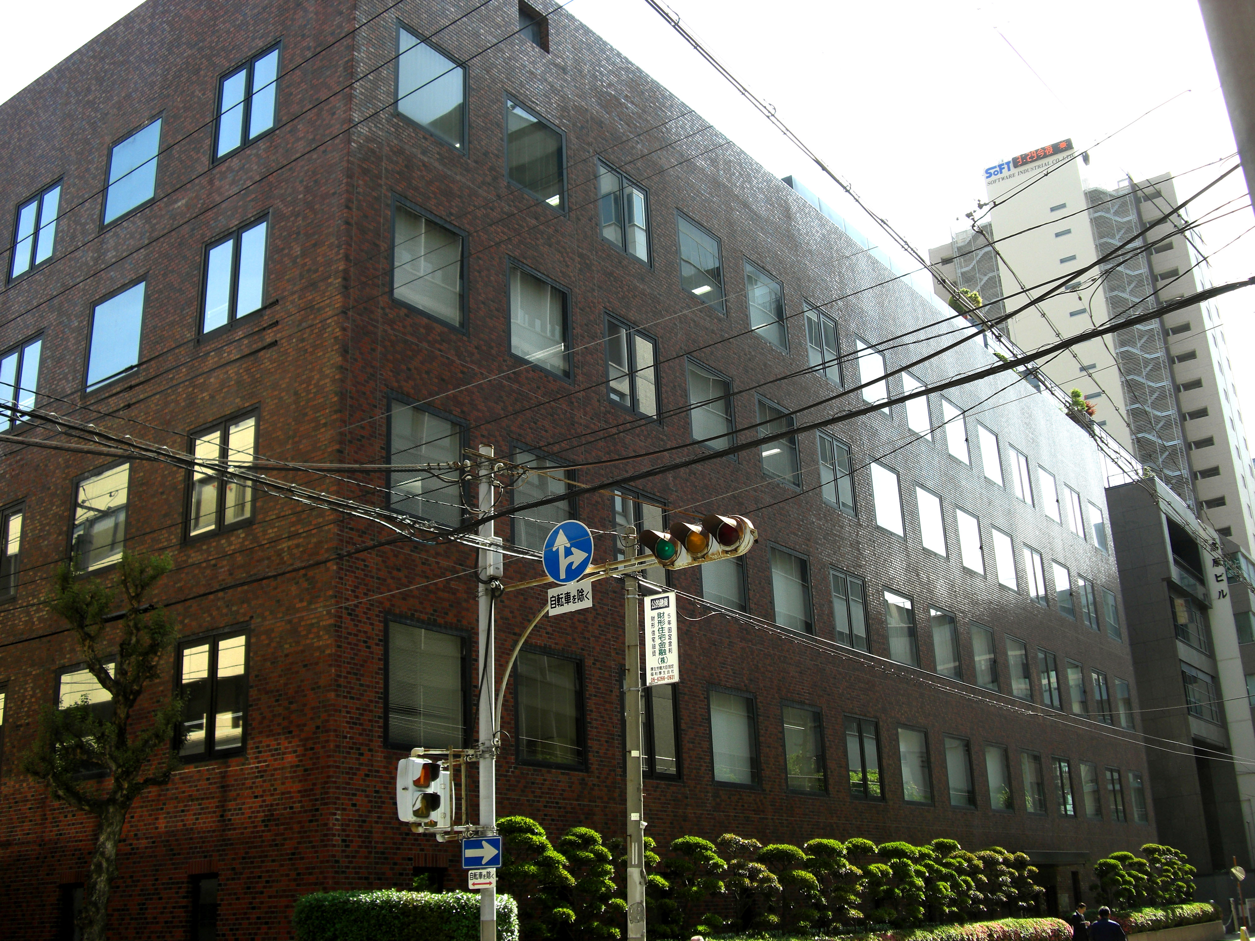 Mitsubishi Tanabe Pharma Corporation, Doshomachi, Chuo-ku, Osaka-City, Osaka, Japan.